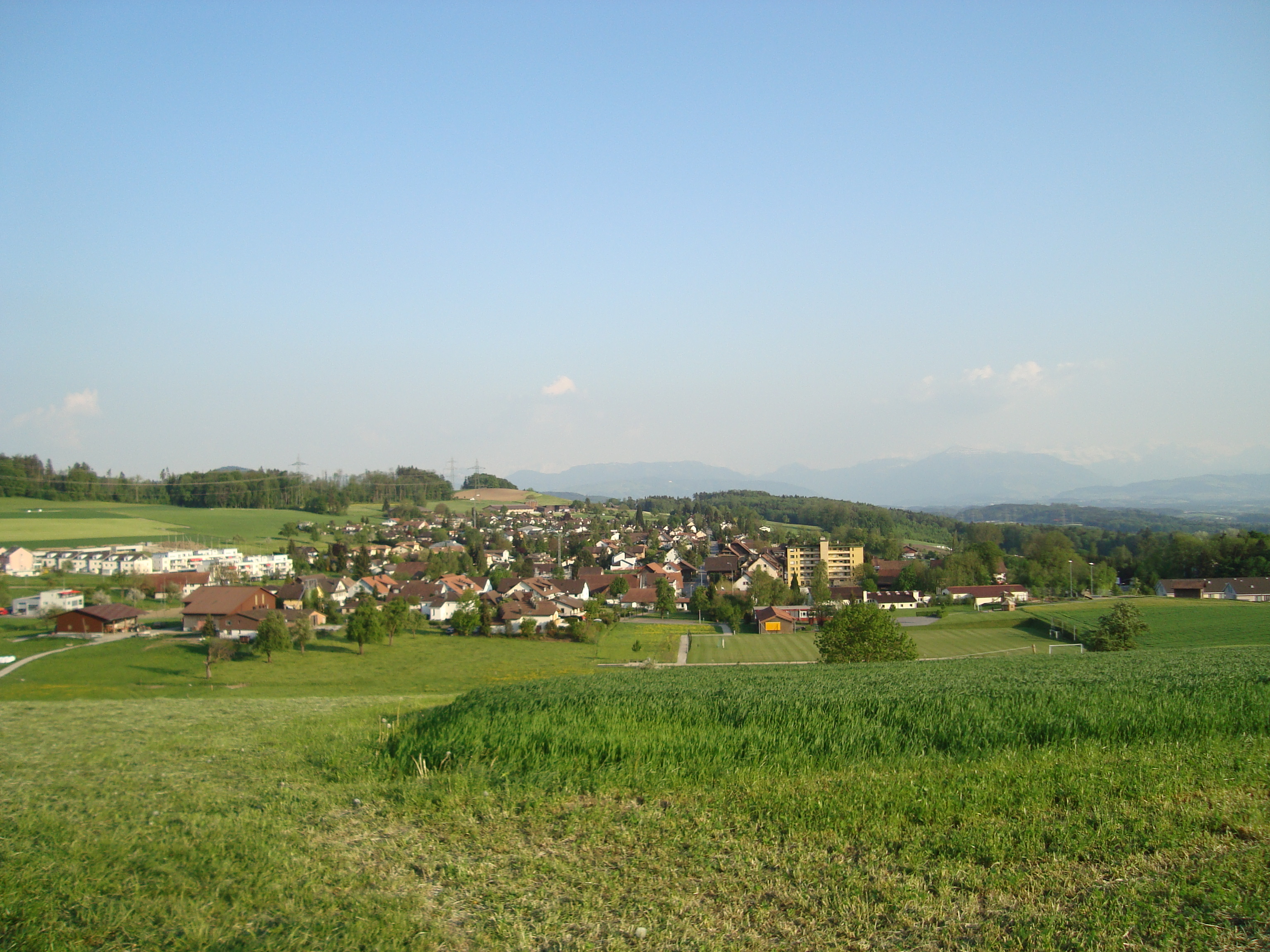 Dorf Arni, gfötelet fom Wiibrguet (Gde Arnin AG) us